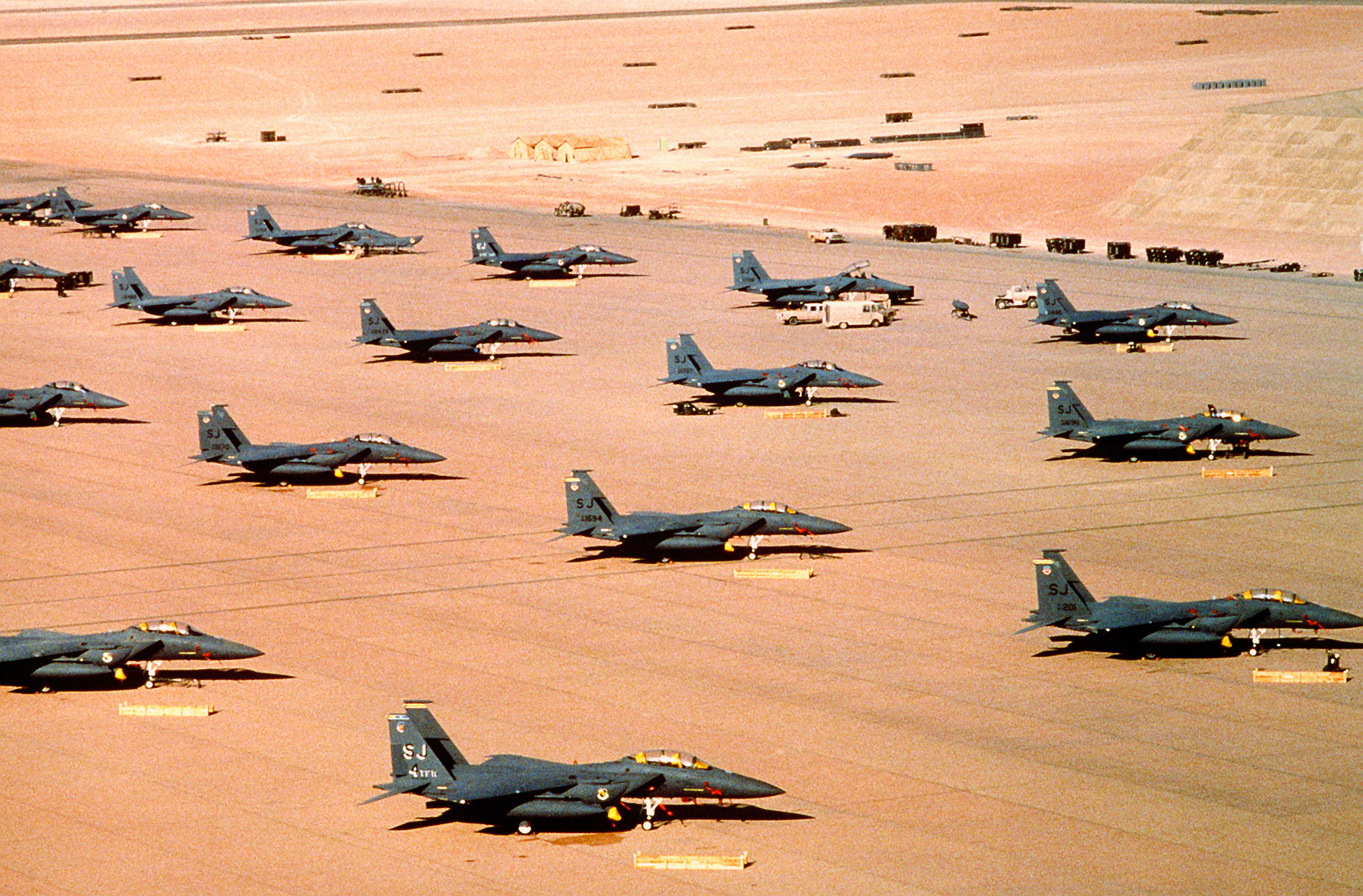 F-15E Eagle fighter aircraft of the 4th Tactical Fighter Wing, Seymour Johnson Air Force Base, N.C., are parked on an air field during Operation Desert Shield.